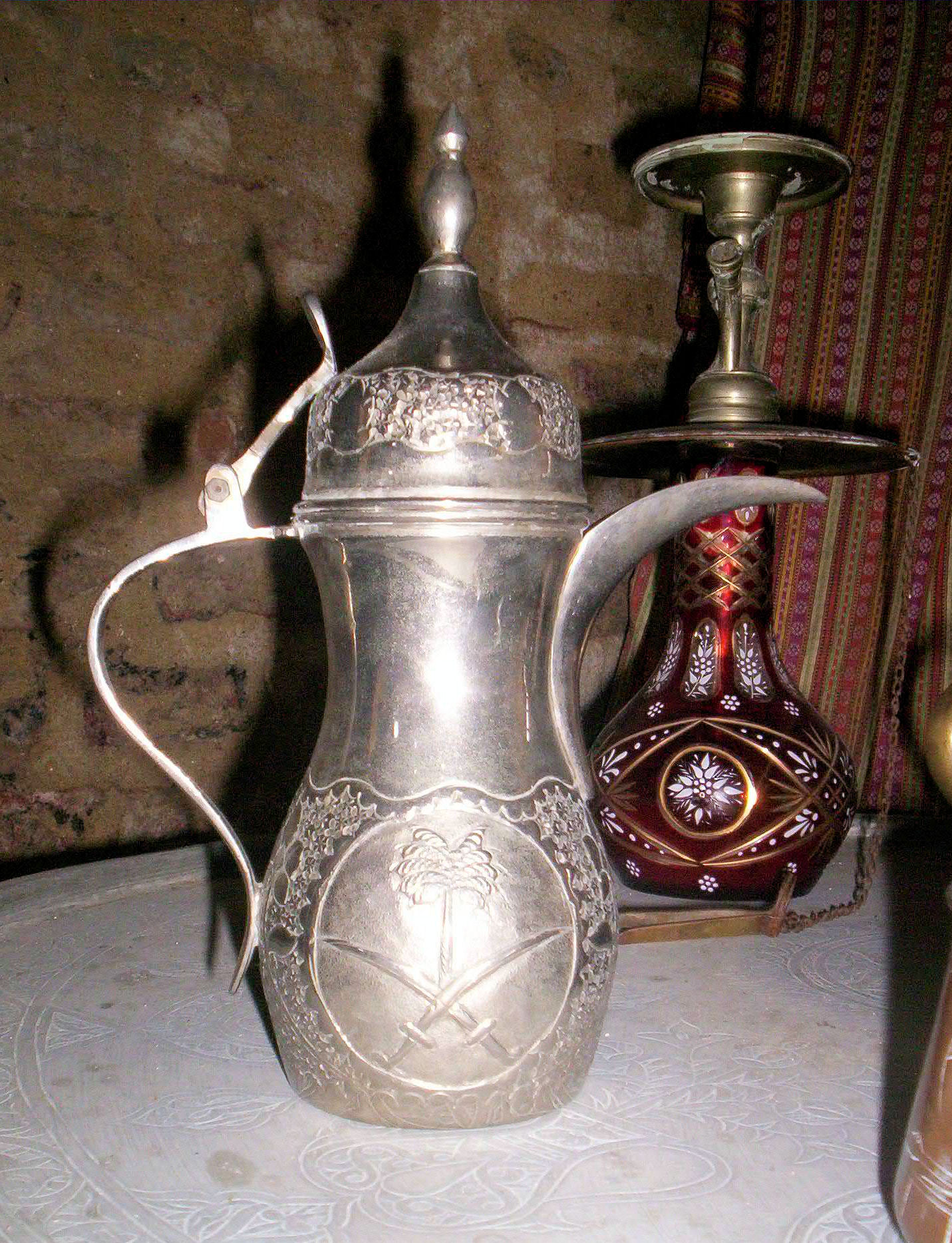 A török néprajzi múzeumból kapott tárgyak a siklósi Malkocs bej-dzsámiban